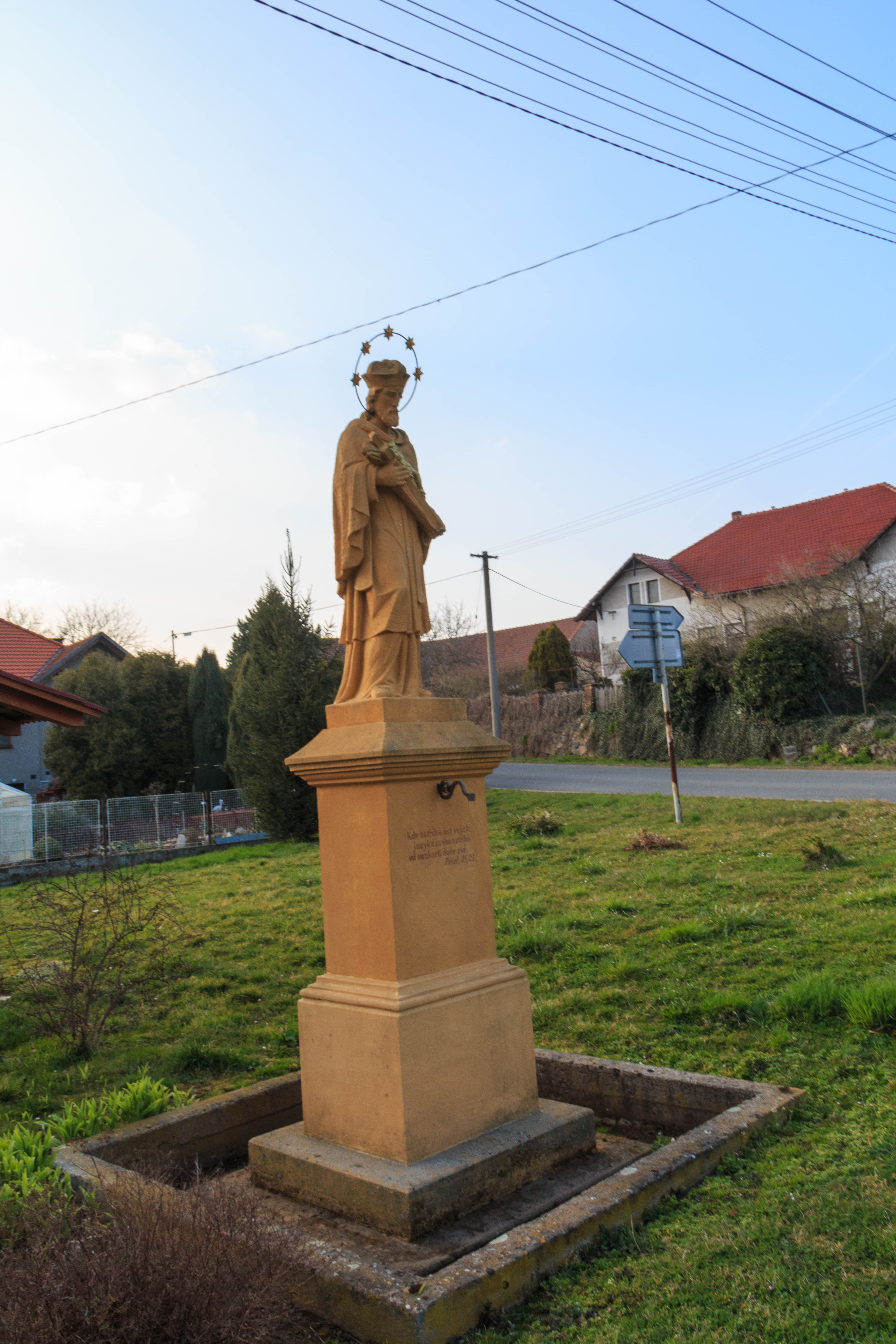 Louka - svatý Jan Nepomucký